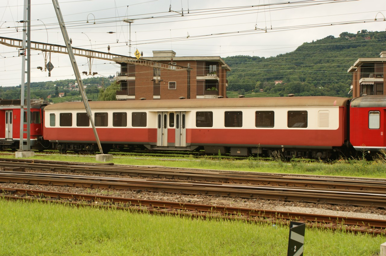 Mittleinstiegswagen ABr des Club San Gottardo in Mendrisio, zuvor Südostbahn, geliefert als Br 241 (SWS 1956) für die Direkte Linie St. Gallen–Luzern (heute Voralpenexpress).